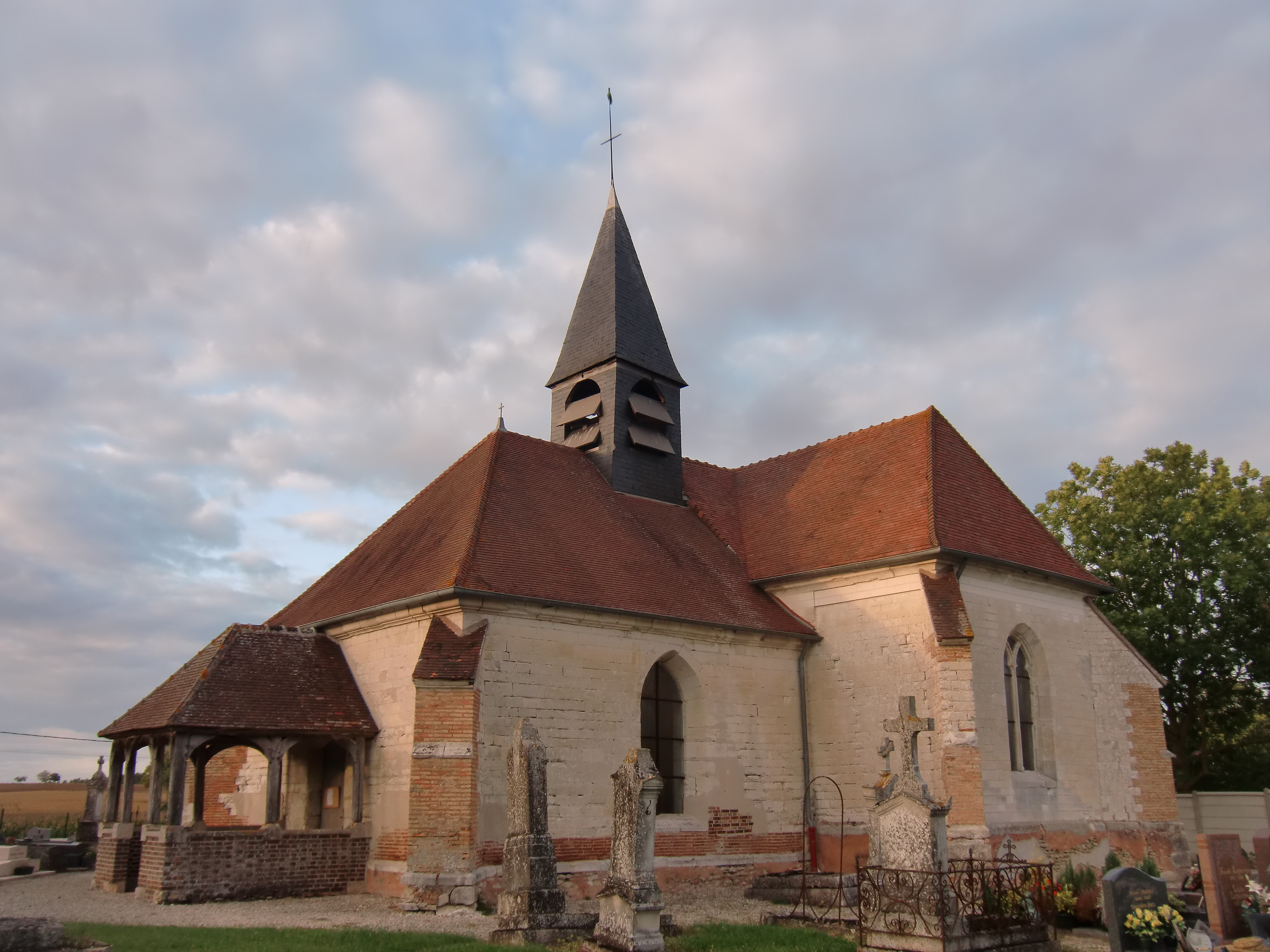 Eglise de Ruvigny (Aube - Champagne - France)